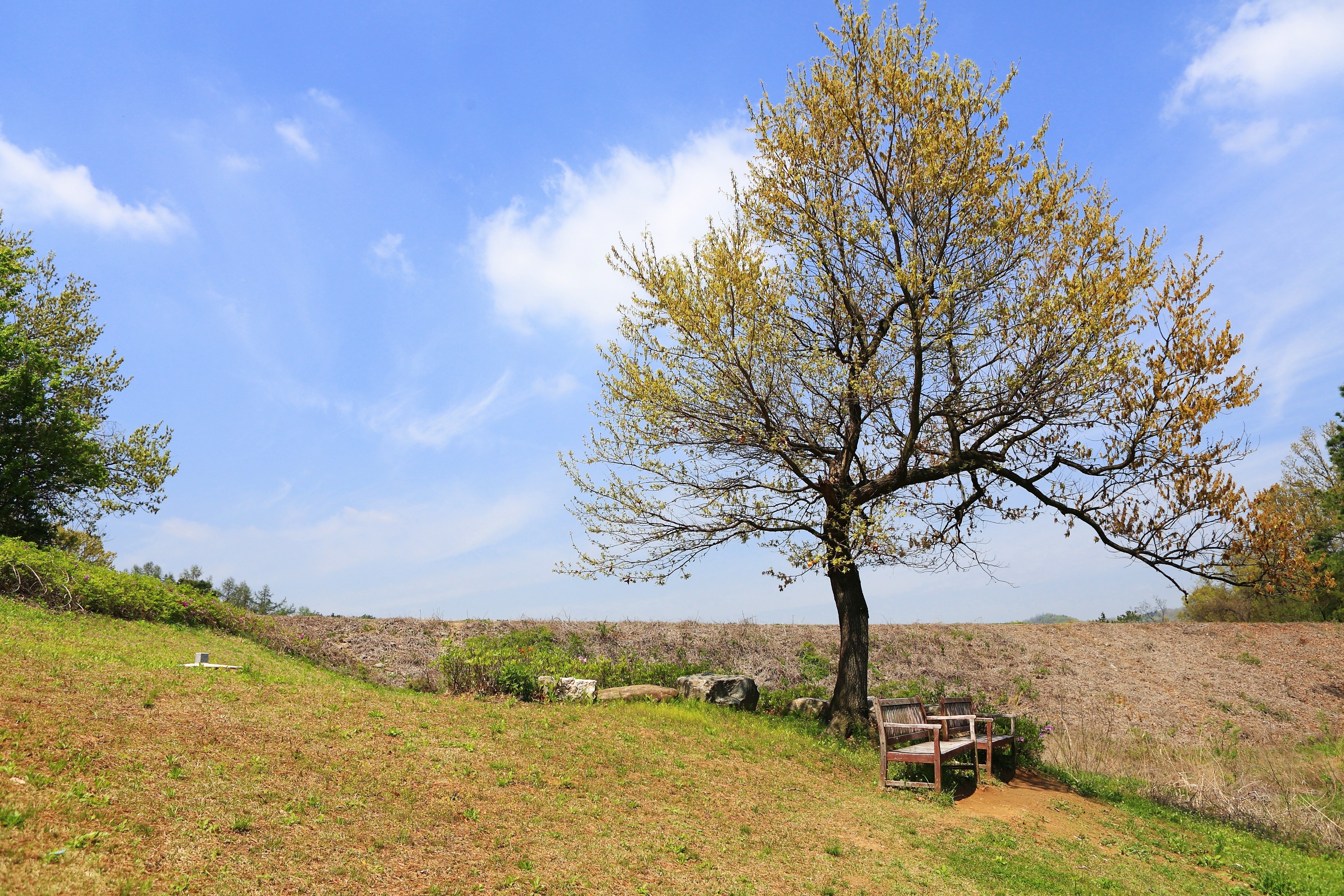 대청호오백리길 1구간_4